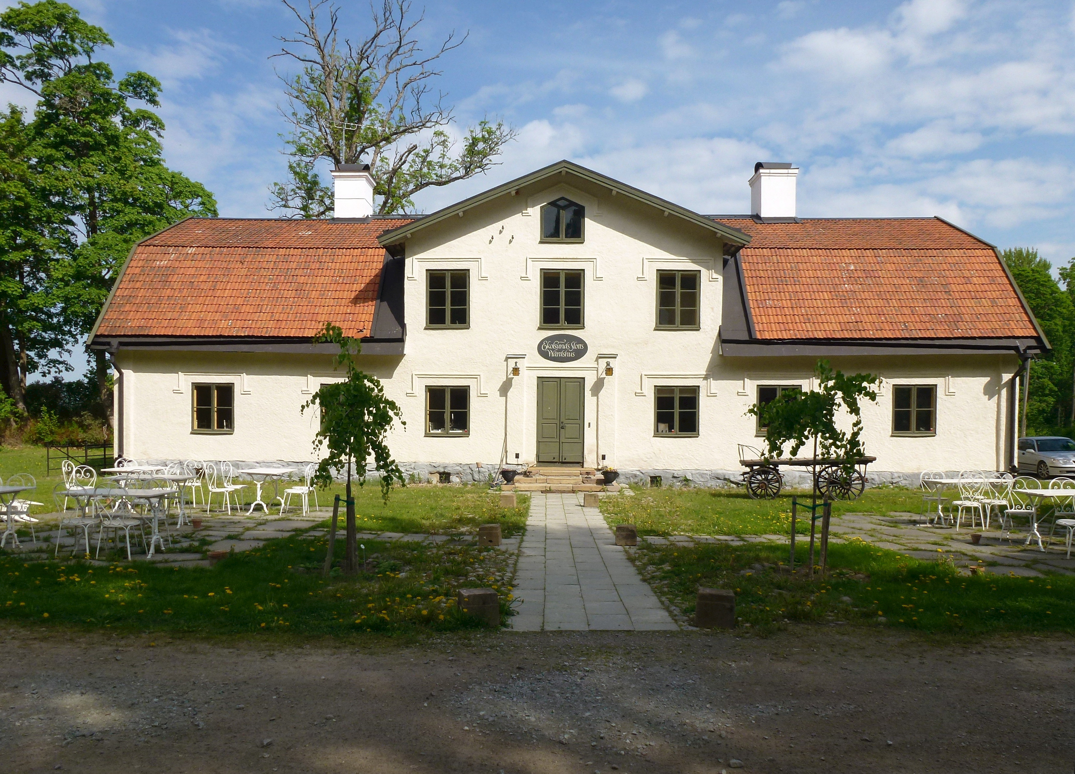 Ekolsunds slotts värdshus